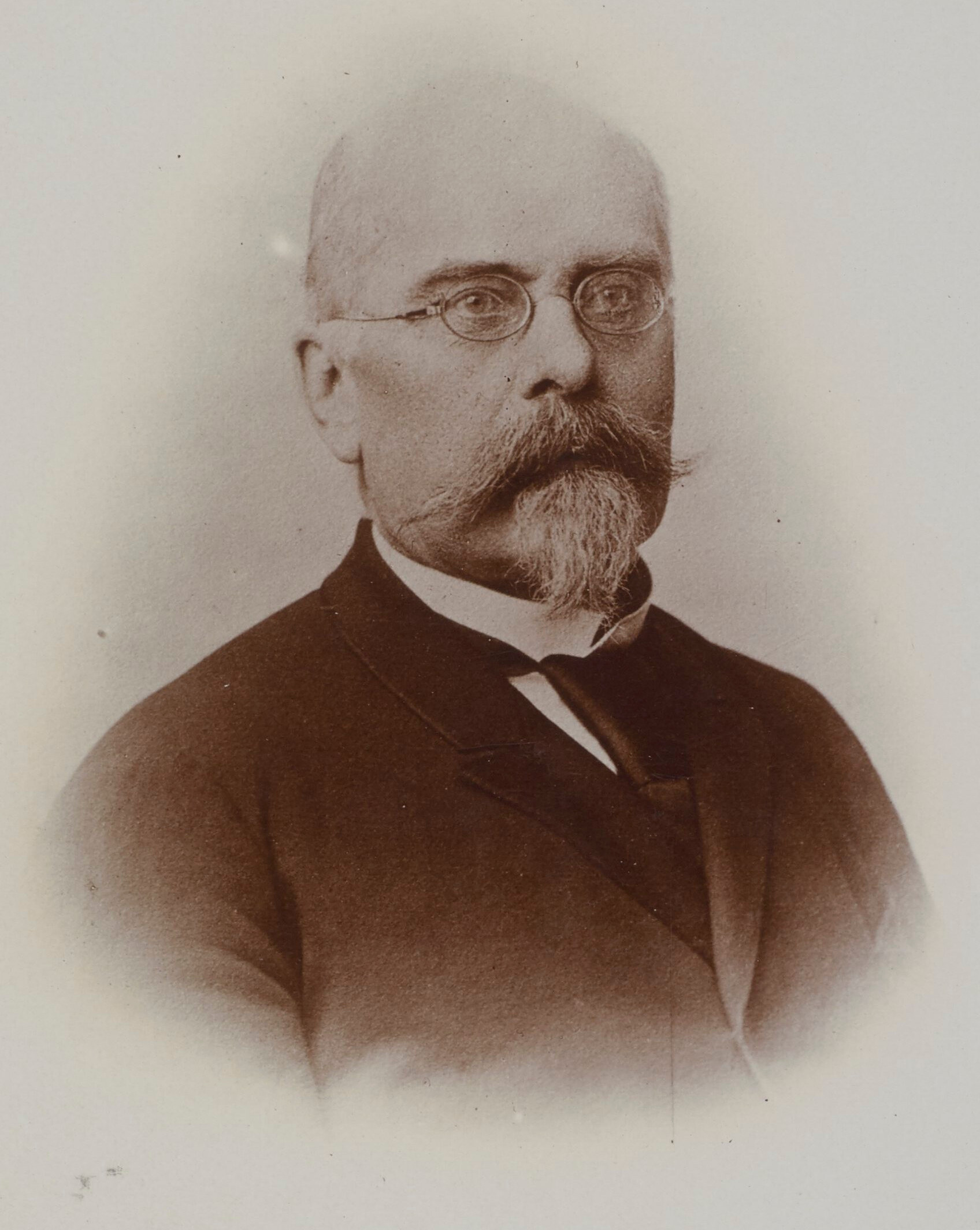 Aleksander Oskierka